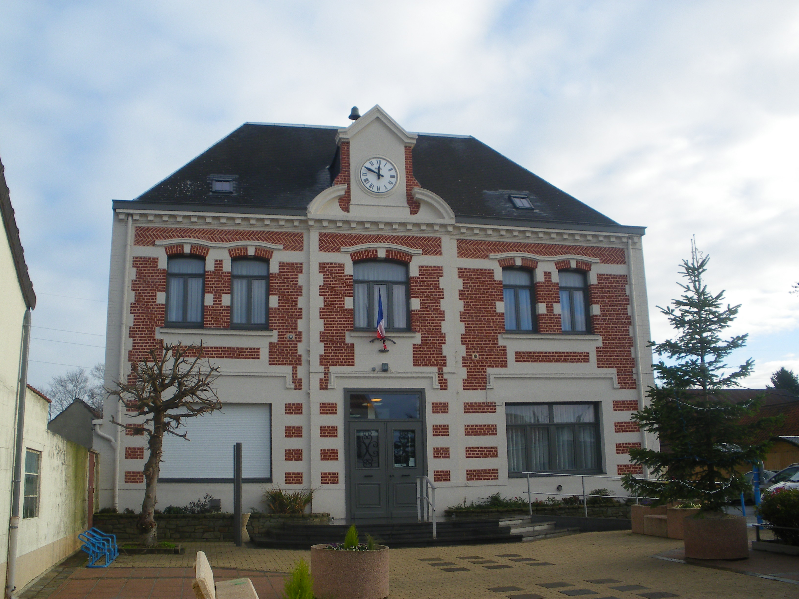 Vue de la mairie de Labourse.